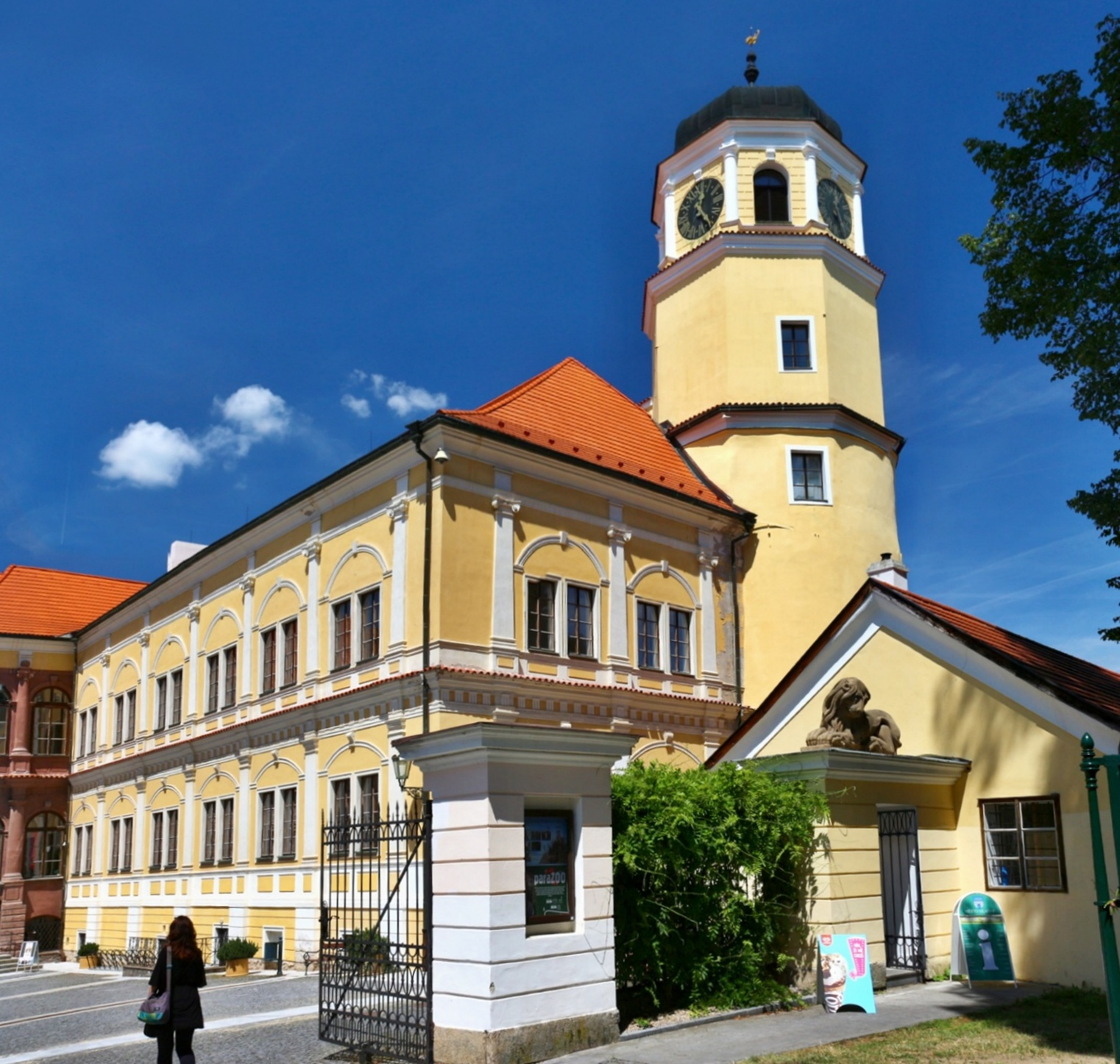 Vlašim